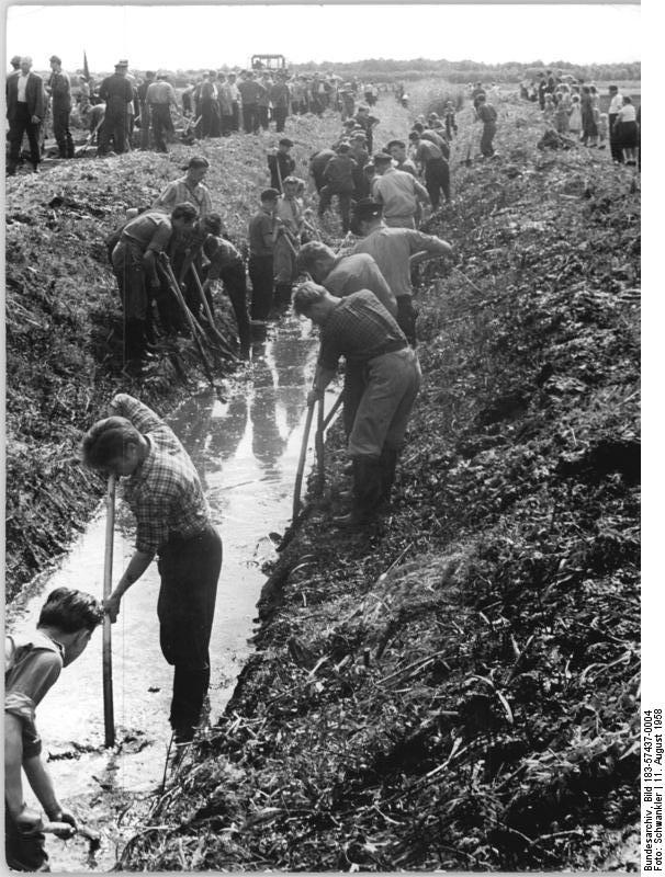 Säubern eines Entwässerungsgrabens Zentralbild Schwankler 11.8.1958 Jugend baut Neue Milchstraße durch Friedländer Große Wiese. Das von der SED Bezirksleitung Neubrandenburg am Sonnabend der Bevölkerung dieses Agrarbezirks unterbreitete Aktionsprogramm zur Urbarmachung und wirtschaftlichen Erschli3ssung eines 15000 ha grossen Moorgebiets im Bereich der Friedländer Grossen Wiese hat in allen Teilen der Bevölkerung grossen Widerhall gefunden. Am 10.8.1958, also bereits einen Tag nach Verkündigung des Programms, trafen sich Hunderte von Jugendlichen mit Mitarbeitern der Bezirksleitung sowie Männer und Frauen aus der Umgebung zum ersten Einsatz auf der Grossen Wiese (Näheres siehe ADN-Meldung Nr. 216 vom 10.8.1958) UBz: Mit den ersten Spatenstichen wird ein verlandeter Abzugsgraben gesäubert.